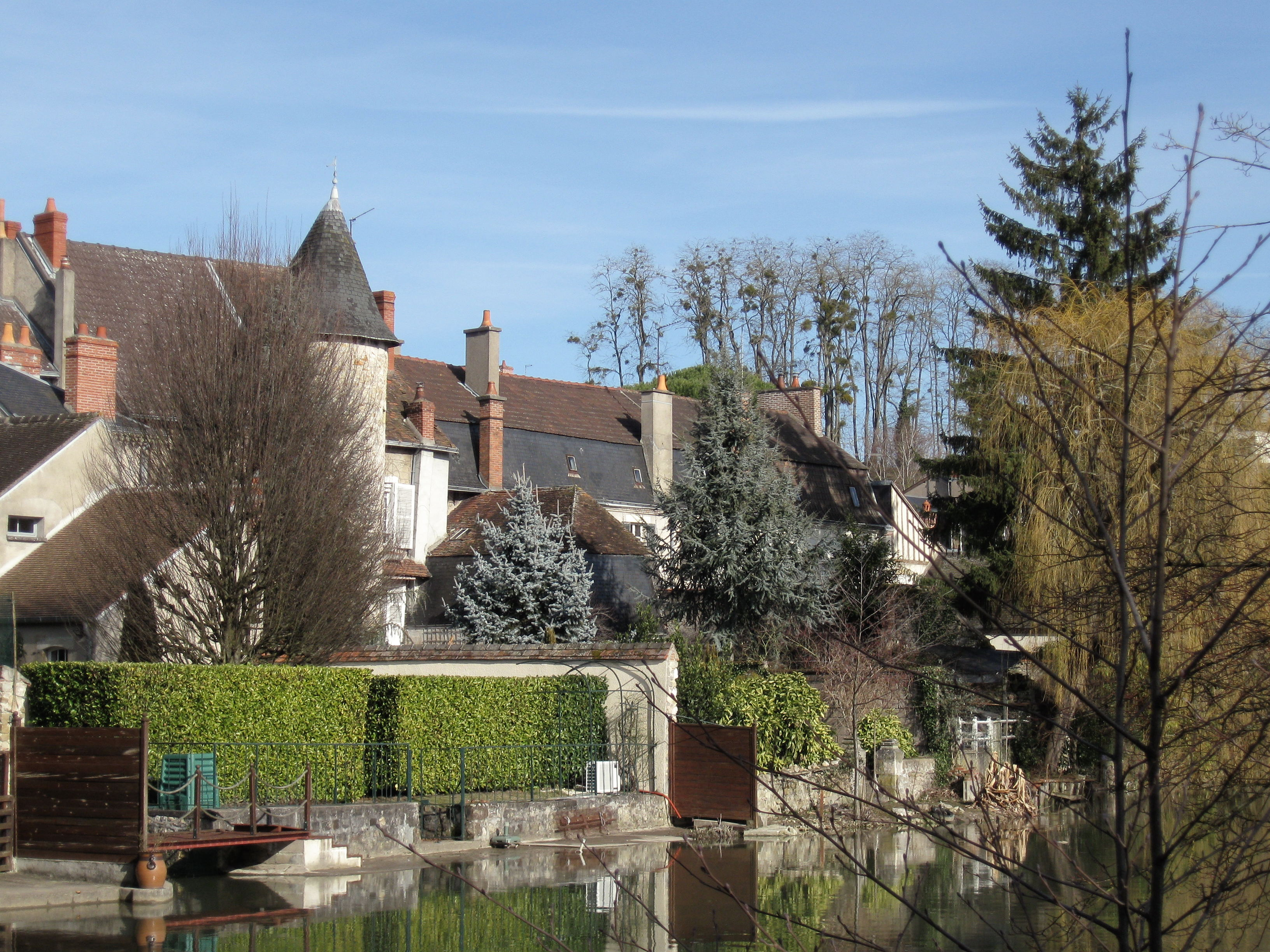 Bords de l'Yèvre, Vierzon, Cher, France